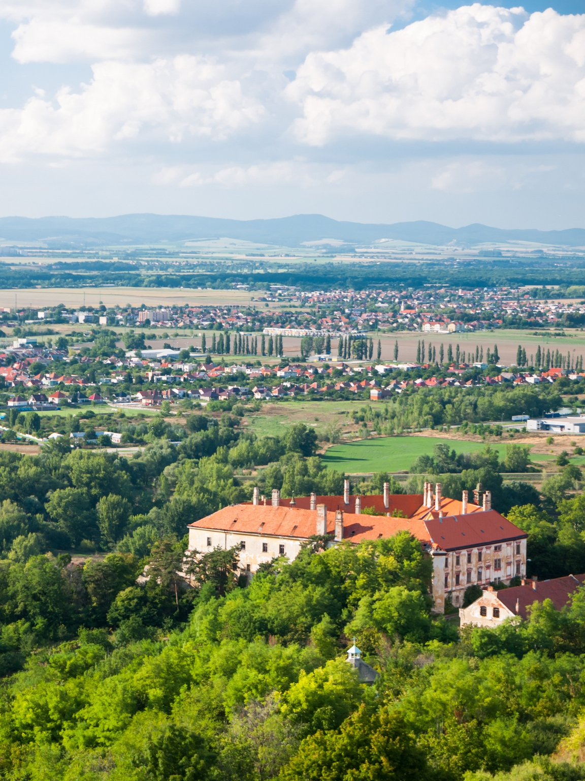 Hlohovecký zámok